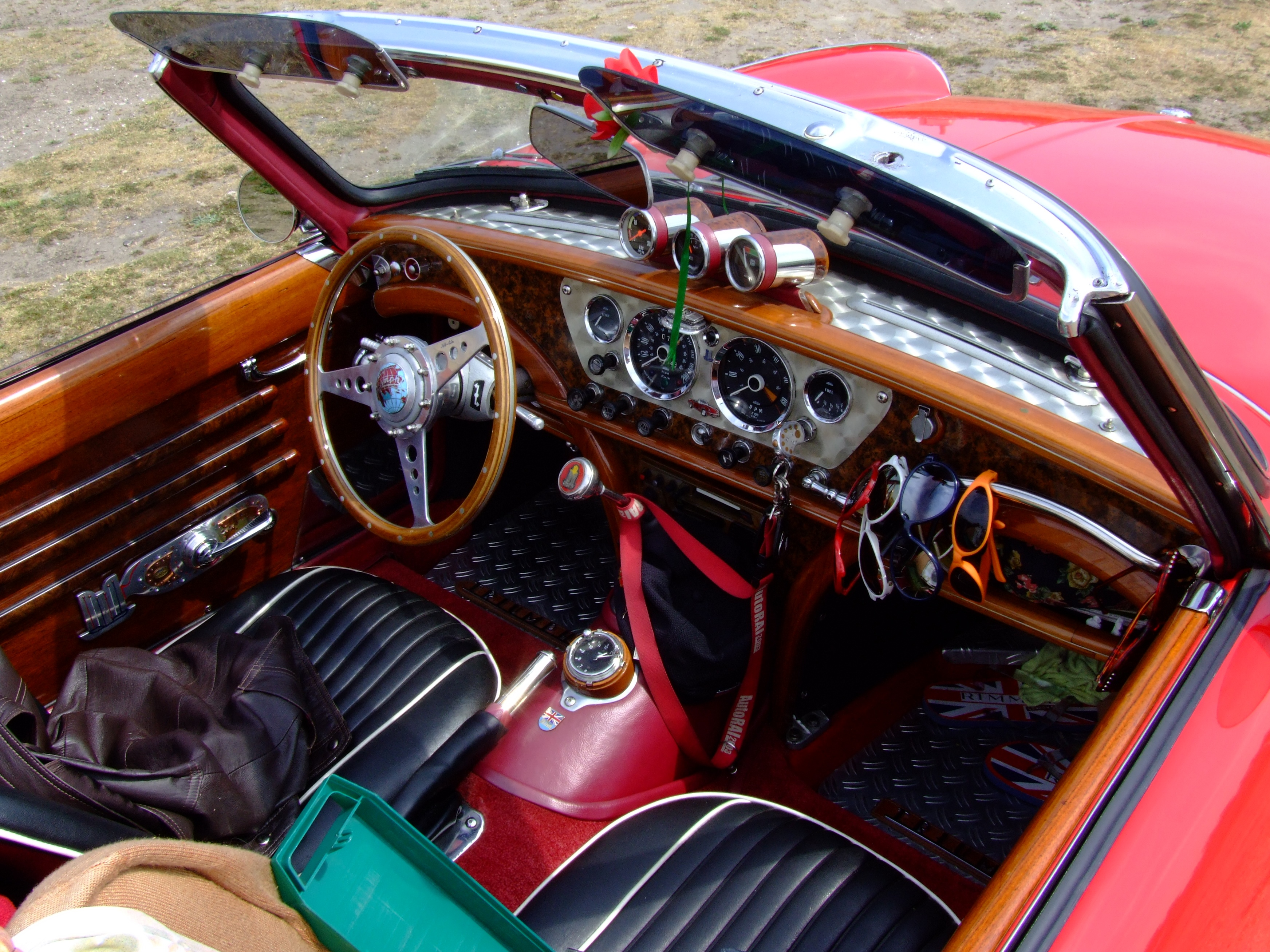 Triumph